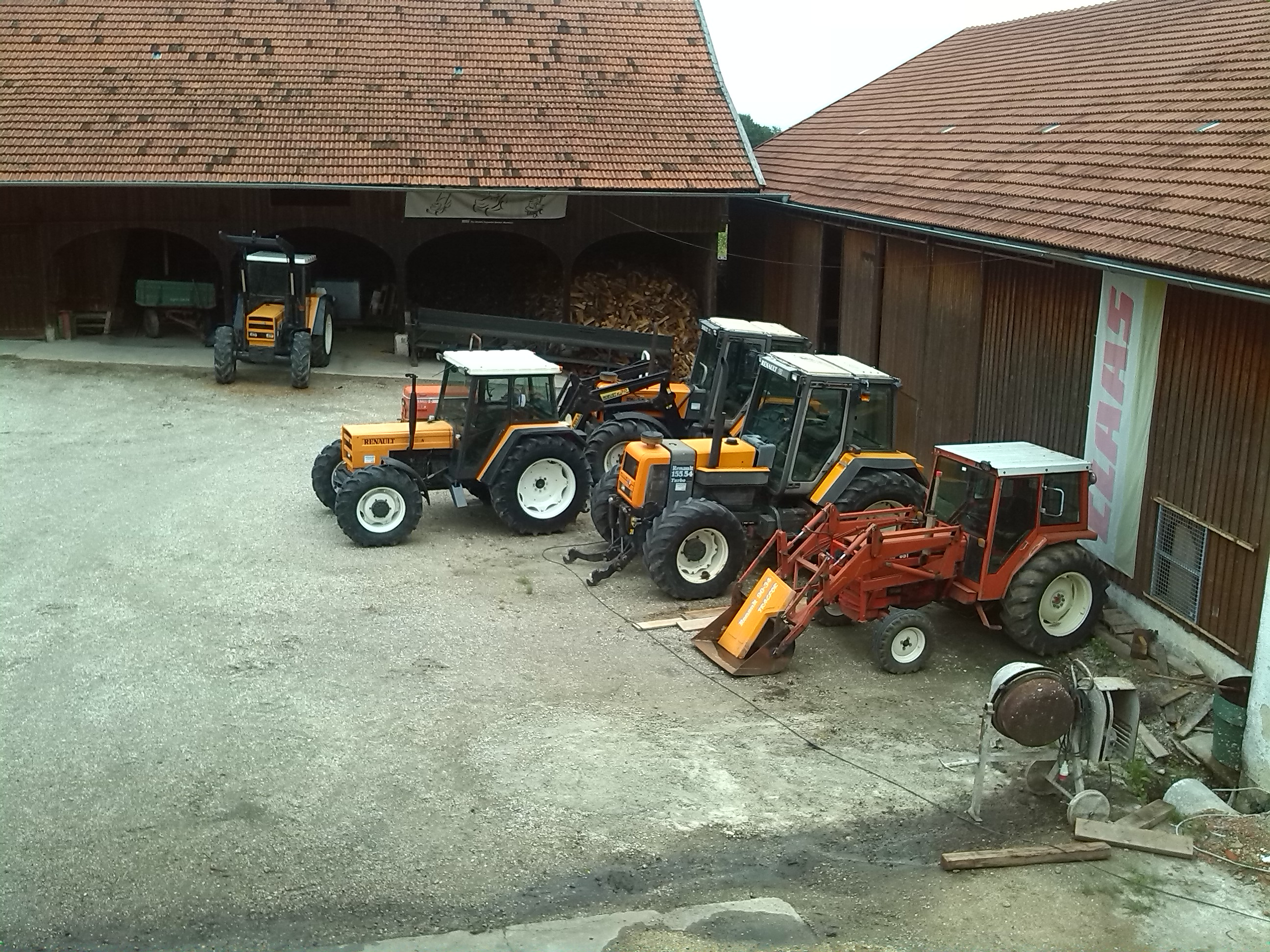 2x Renault 751-4s; 1x Renault 551 mit Frontlader; 1x Renault 106.54 mit Frontlader; 1x Renault 155.54 Turbo